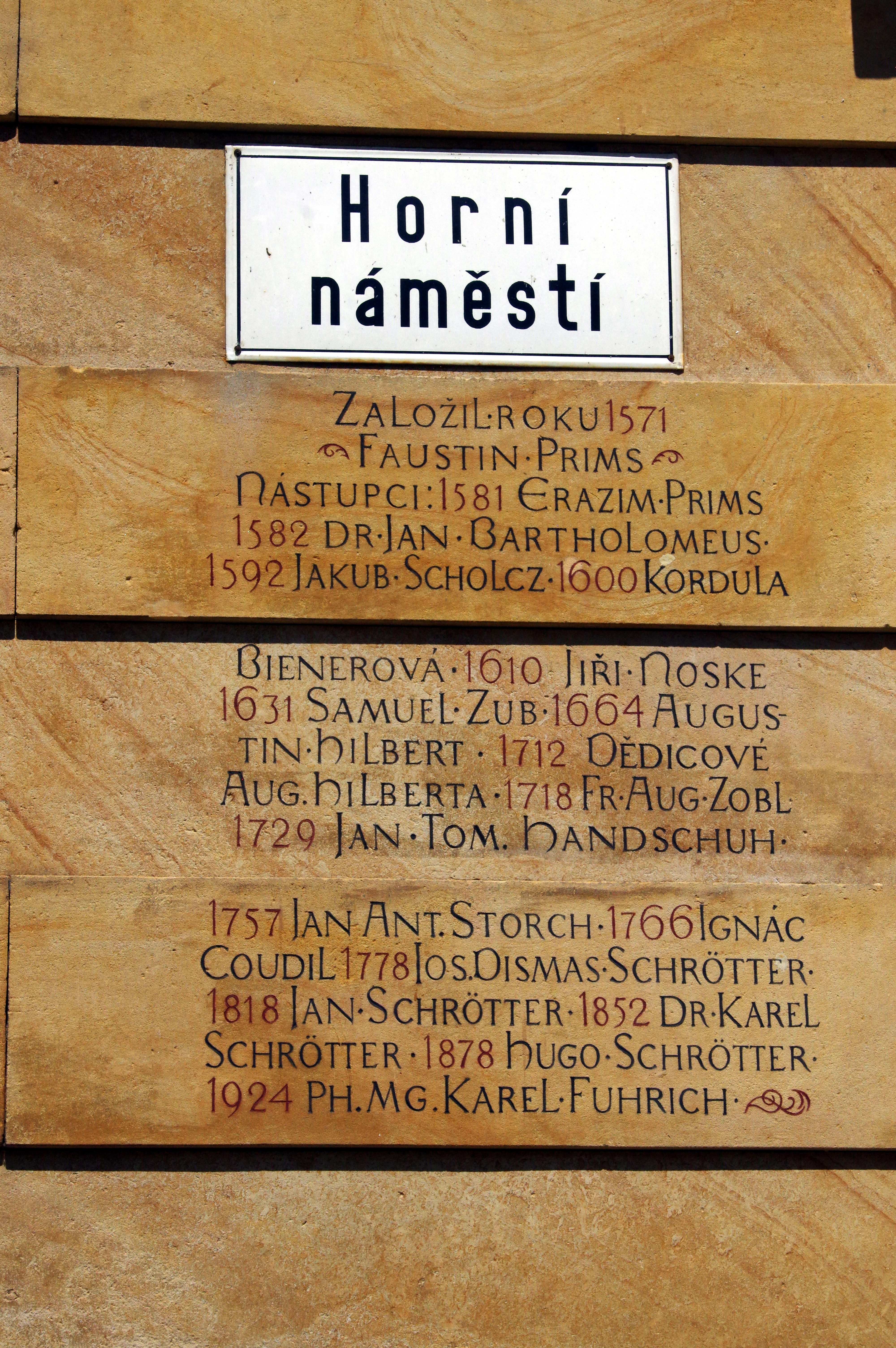 8.8.17 2 Olomouc 088